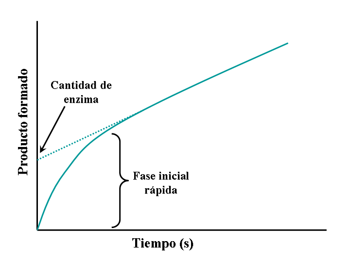 Fase inicial rápida en una curva de una reacción enzimática.